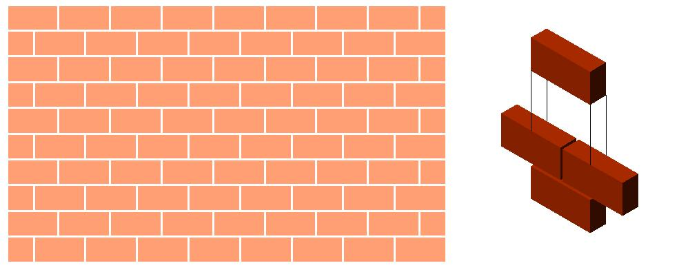 Aparejo en panderete